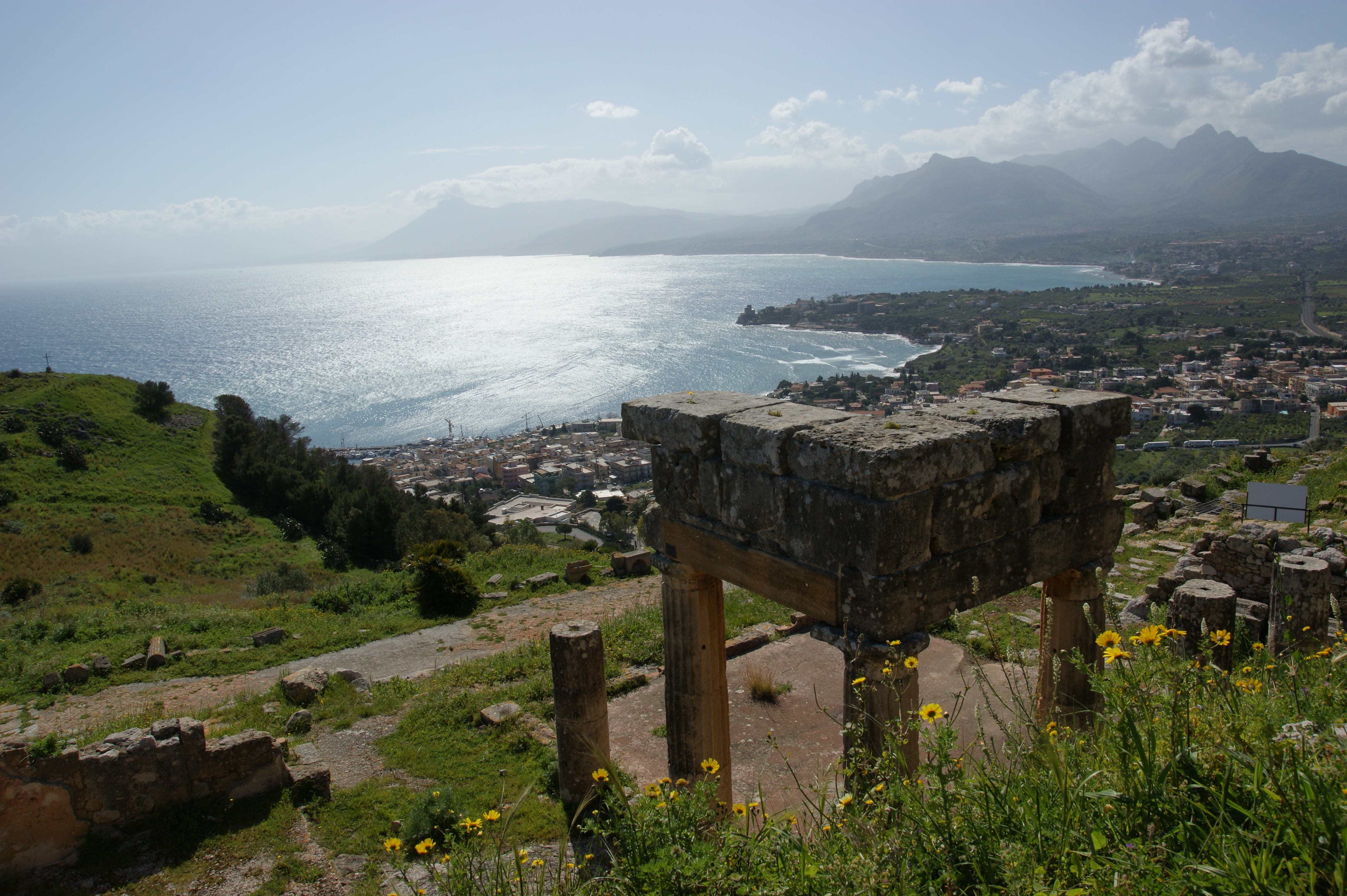 2009-03-22 03-29 Sizilien 389 Solunto